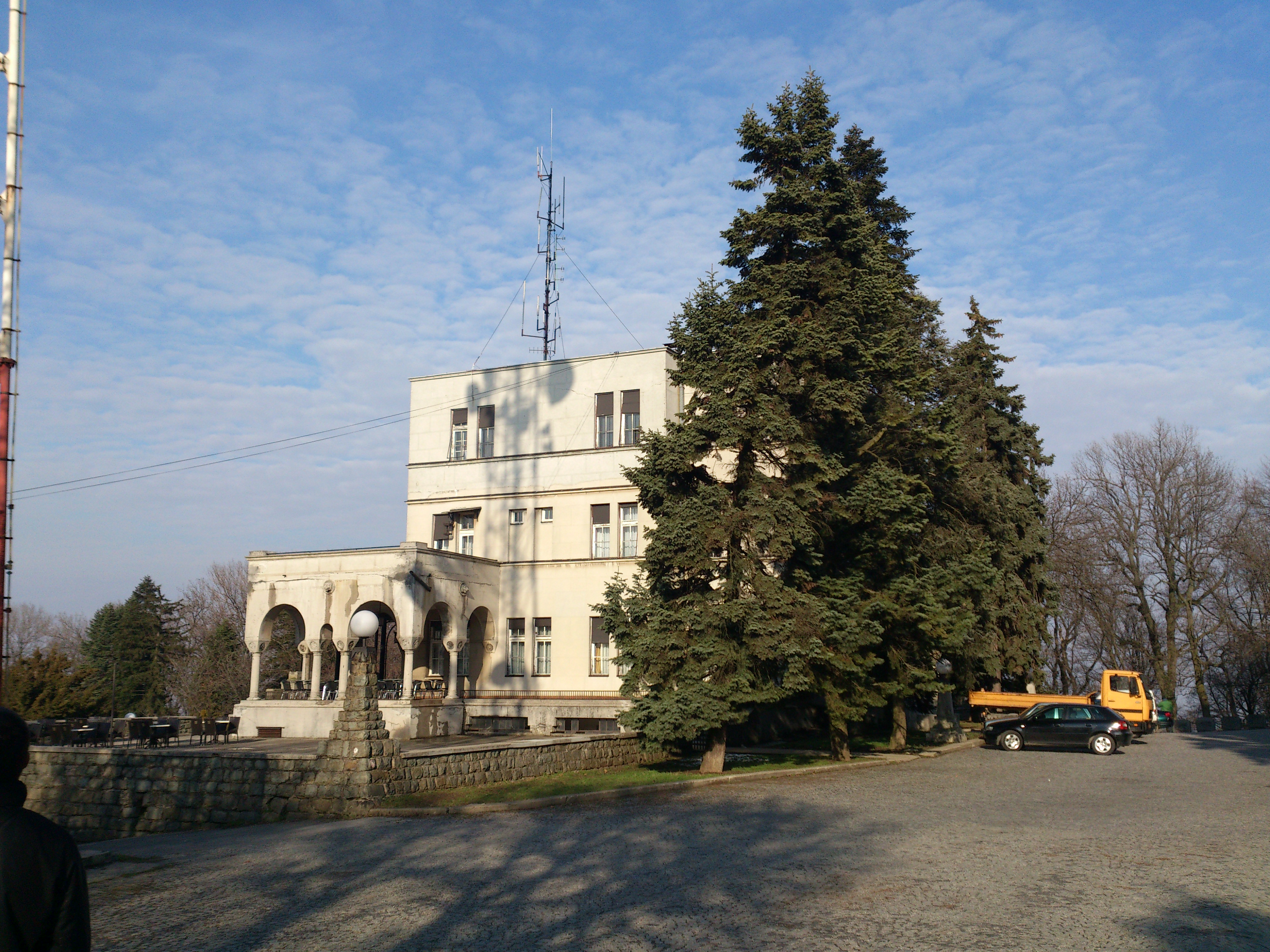 Хотел Авала на Авали.